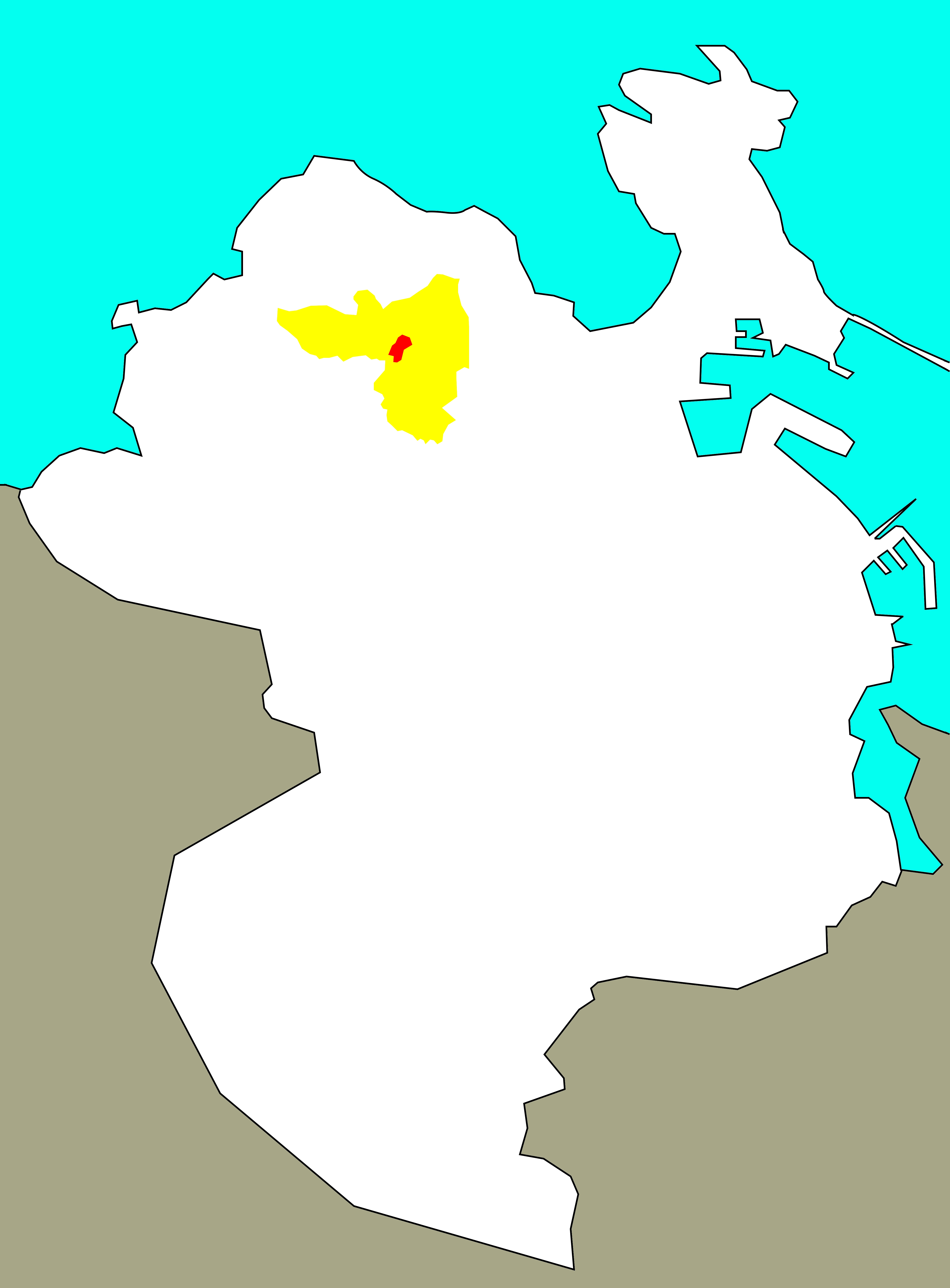 Situación de Entrecasas no "barrio-territorio" de San Pedro de Visma.[1]